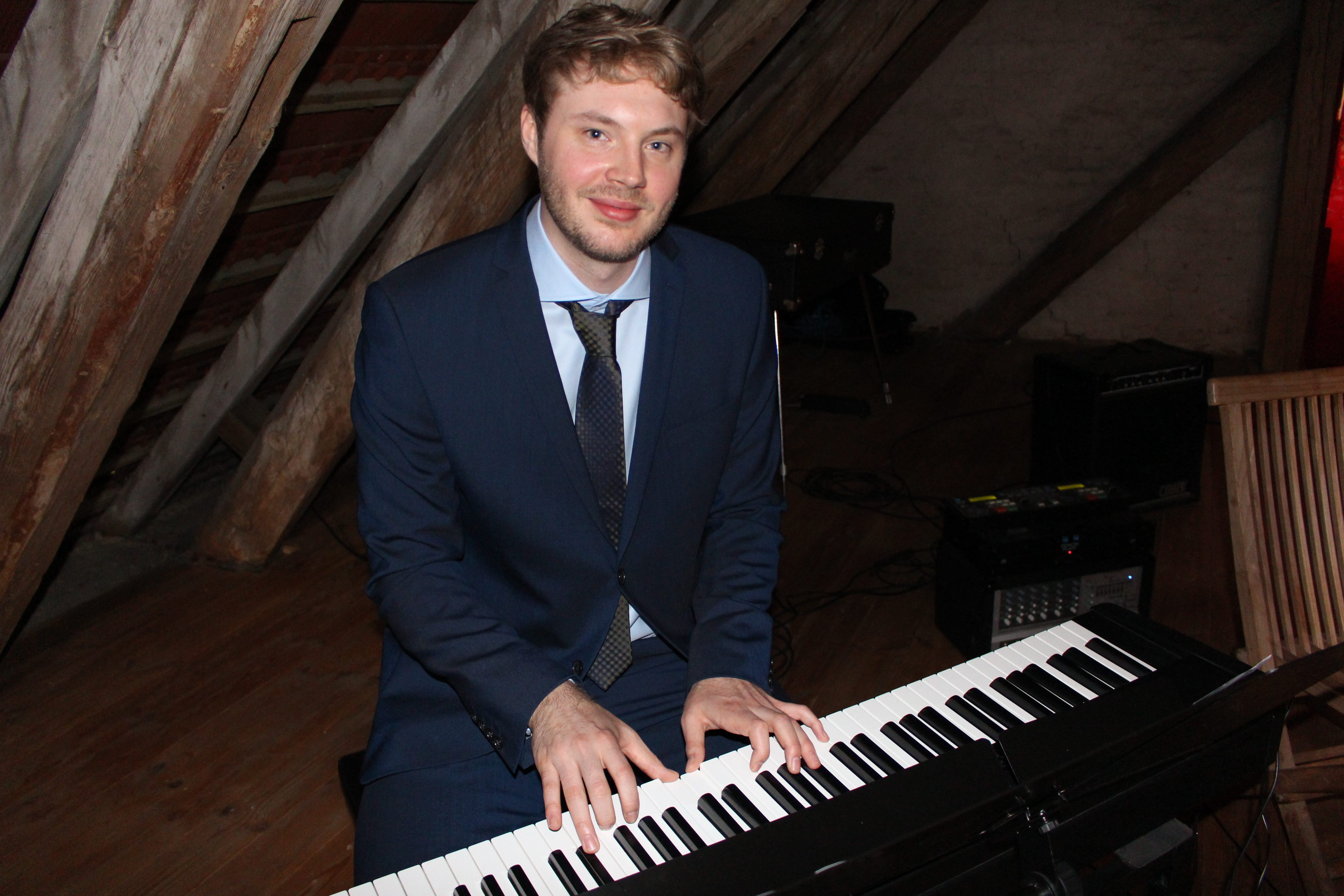 Oliver Seidel bei einer Hochzeit 2015.